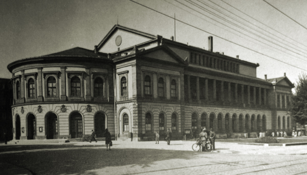 Gotha Theater ~1900